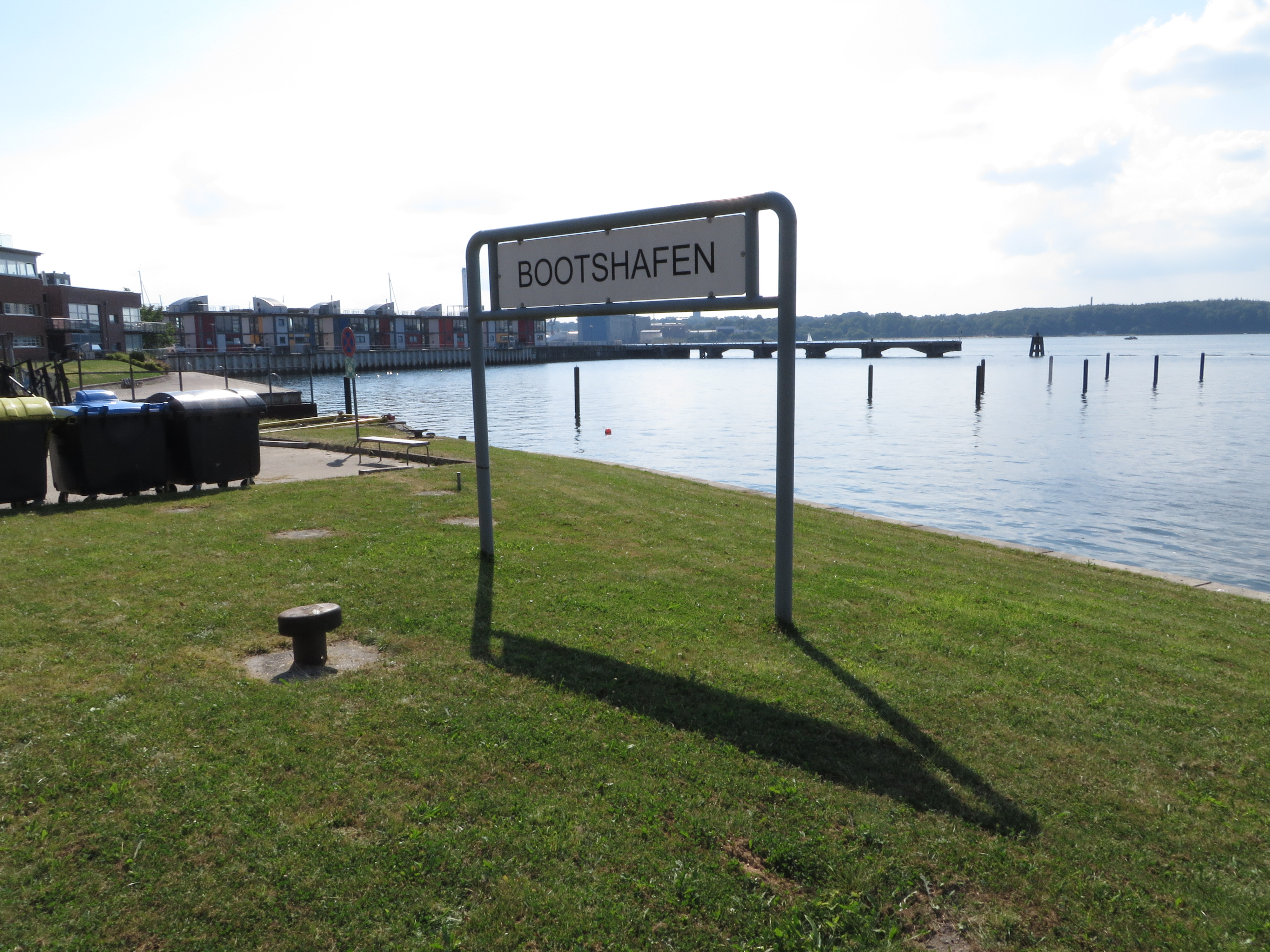 Schild zum Bootshafen der Marineschule Mürwik (Flensburg 2014), Bild 01